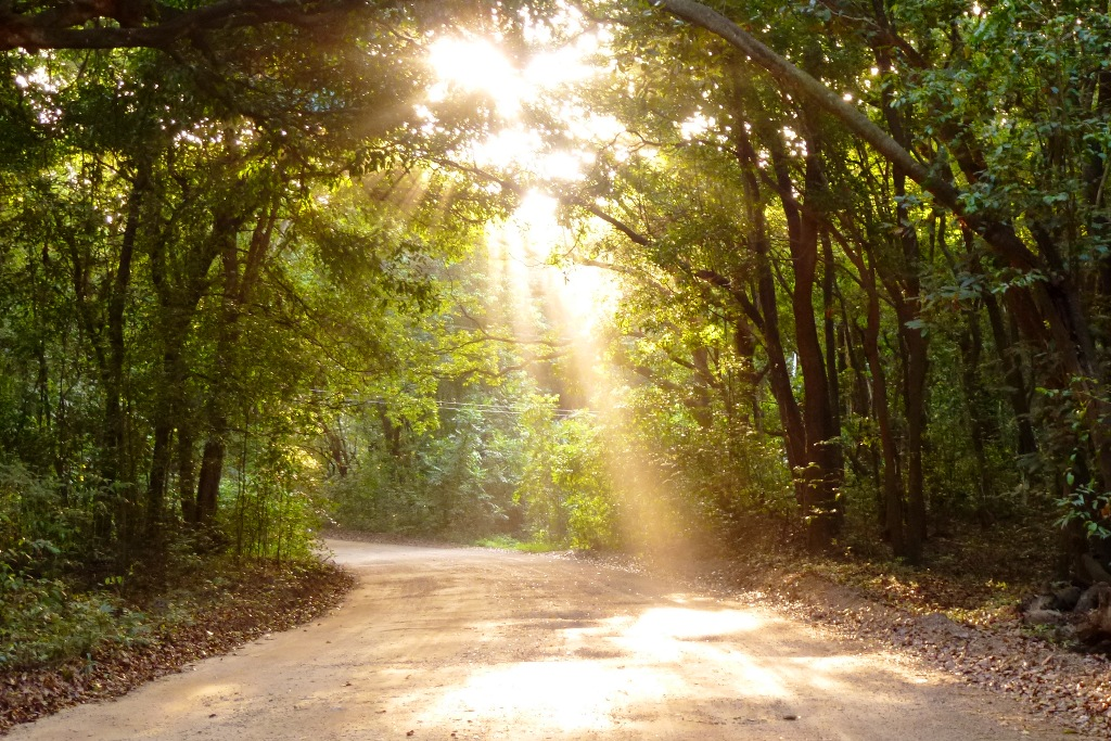 Estrada de acesso a Floresta Nacional da Restinga de Cabedelo, na Paraíba. Beleza no interior de um dos mais raros tipos fitofisionomicos da Mata Atlantica, ameaçada pela ocupação humana.